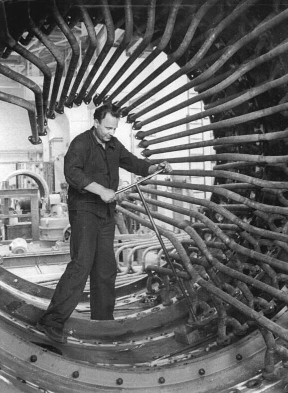 Zentralbild-Biscan Frö-Qu 18.6.1959 Mehr Filter für die chemische Industrie. Die Filterbauer des volkseigenen Karl-Liebknecht-Werks in Magdeburg, die fast ausschließlich für die chemische Industrie der DDR und der sozialistischen Länder arbeiten, werden in diesem Jahr um 18 % mehr Filter produzieren als im Vorjahr. Das DAMW (Deutsches Amt für Material- und Warenprüfung) hat in Anerkennung der Qualitätsarbeit für 25 Filtertypen das Gütezeichen der "Sonderklasse" gegeben. Für weitere 15 Filtertypen hat das Liebknecht-Werk das Gütezeichen "1" erhalten. UBz. Beim körperlichen Einsatz: Hans-Günter Hoffmann, Lehrer an der SED-Bezirksparteischule in Ballenstedt, beim Montieren der Saugrohre in einem 30-Quadratmeter-Filter für eine Zuckerfabrik.